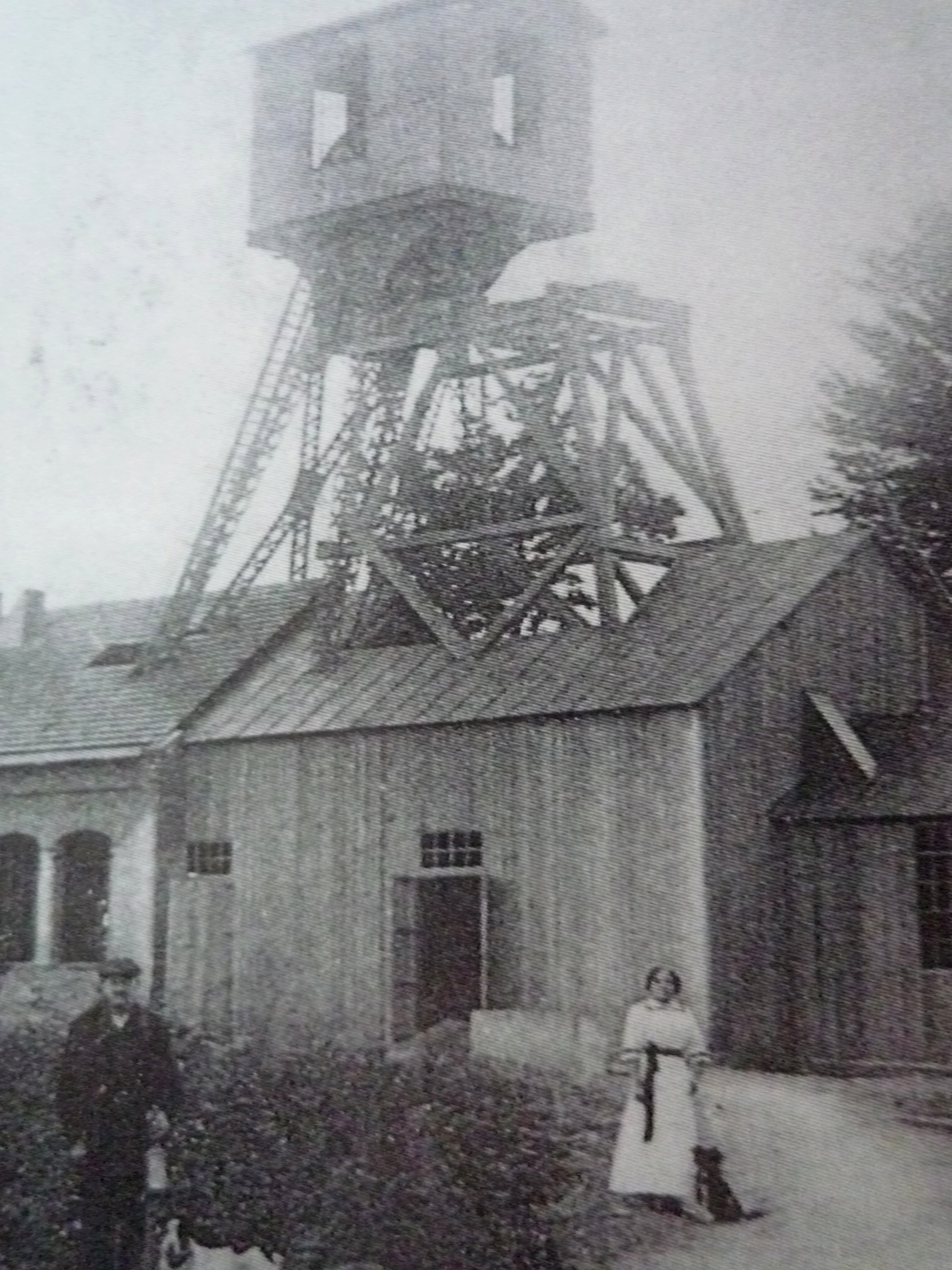 La Fosse n° 10 bis de la Compagnie des mines de Nœux était un charbonnage constitué d'un seul puits situé à Bouvigny-Boyeffles, Pas-de-Calais, Nord-Pas-de-Calais, France.